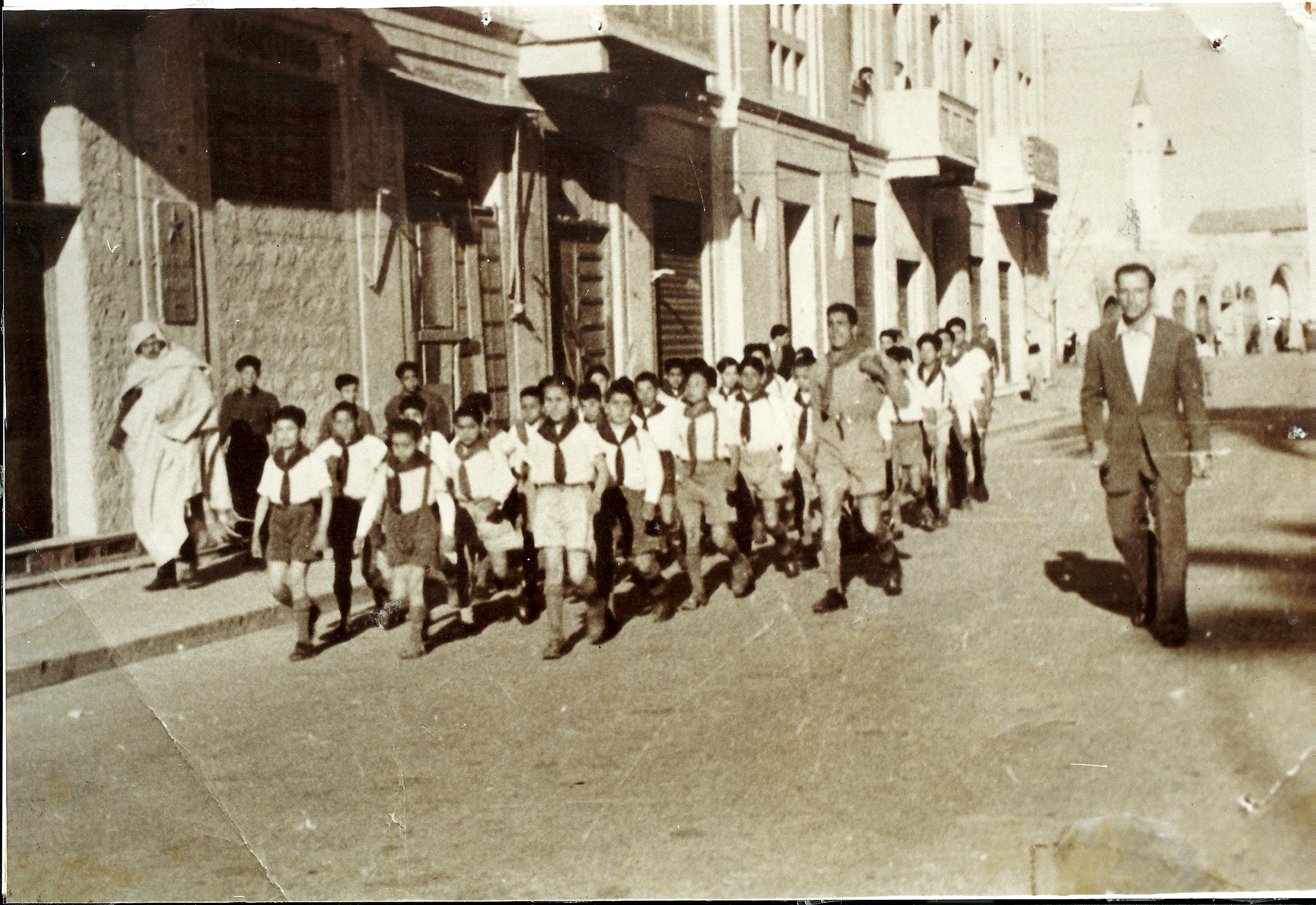 בתמונה רואים מצעד בטריפולי של חברי תנועת הנוער "הצופים העבריים"